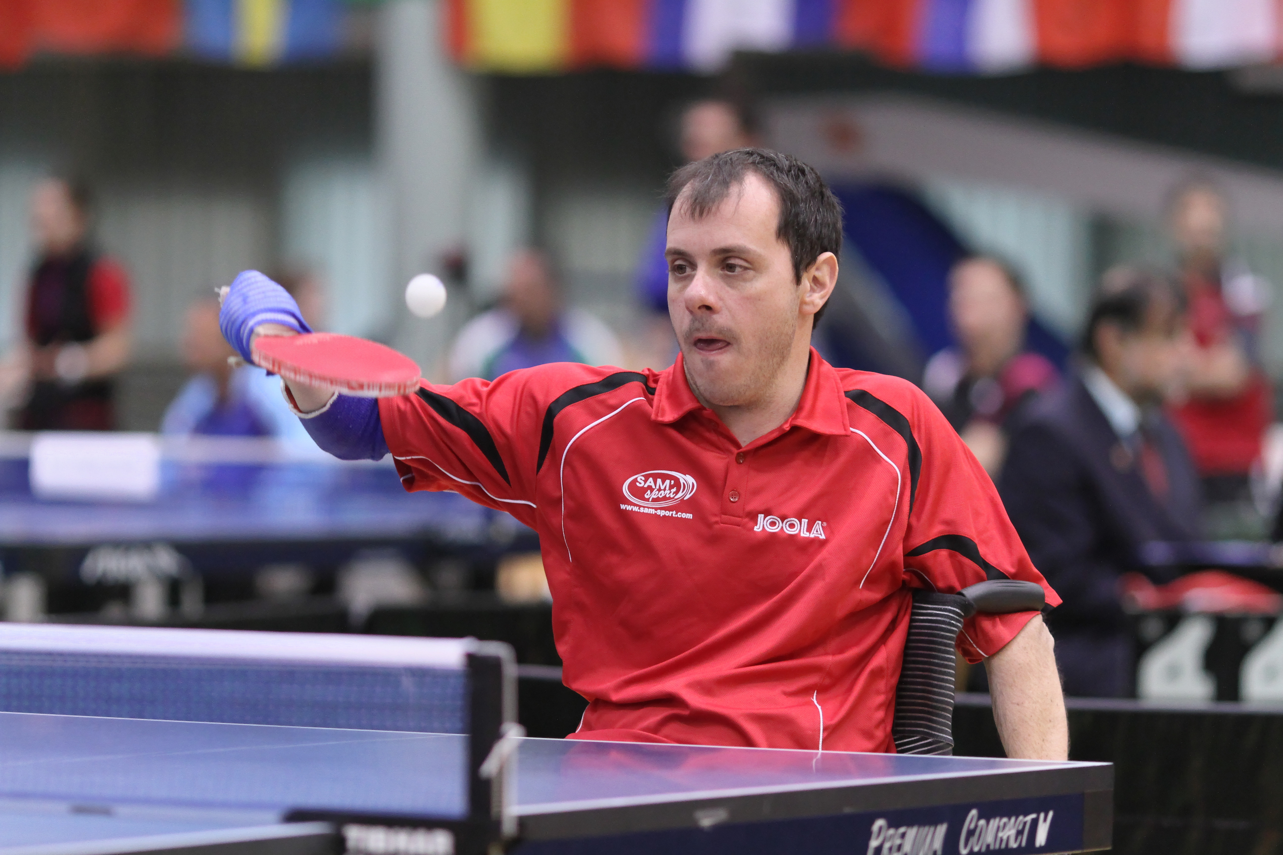 DUCAY Jean-Francois (FRA) IMG_5884_DxO